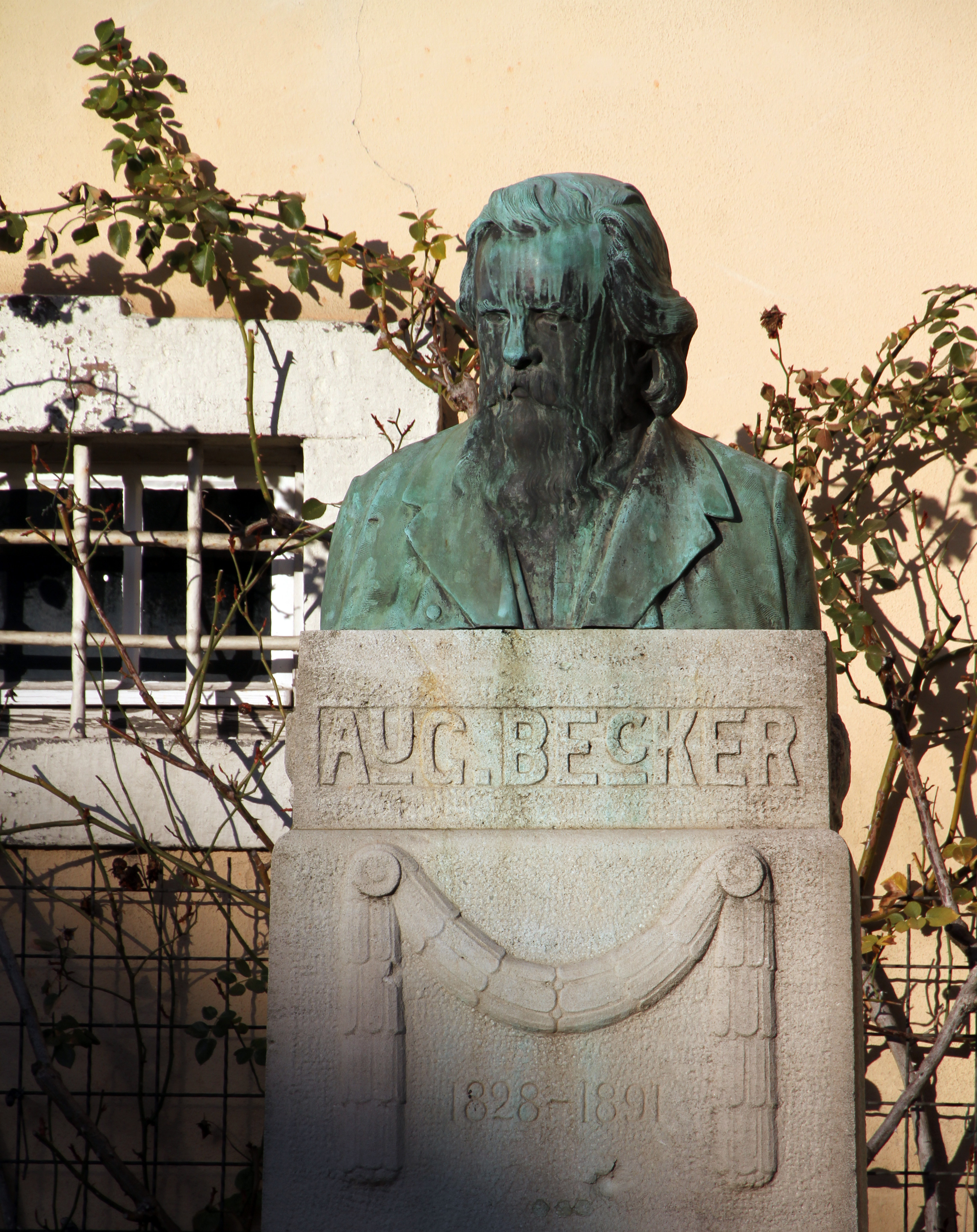 Klingenmünster